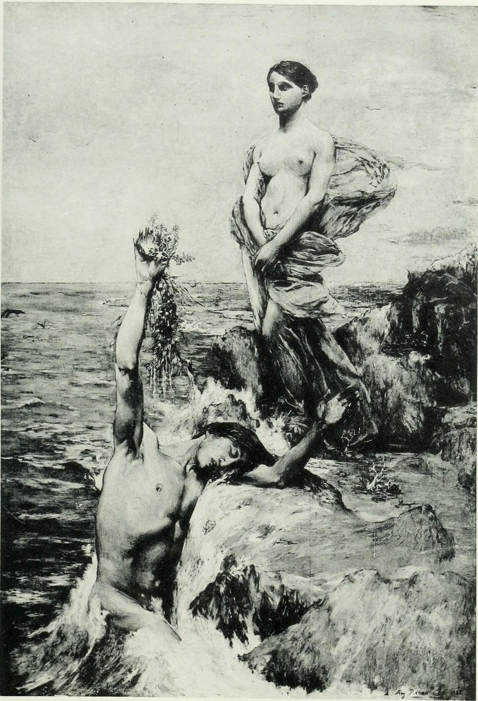 Le Plongeur